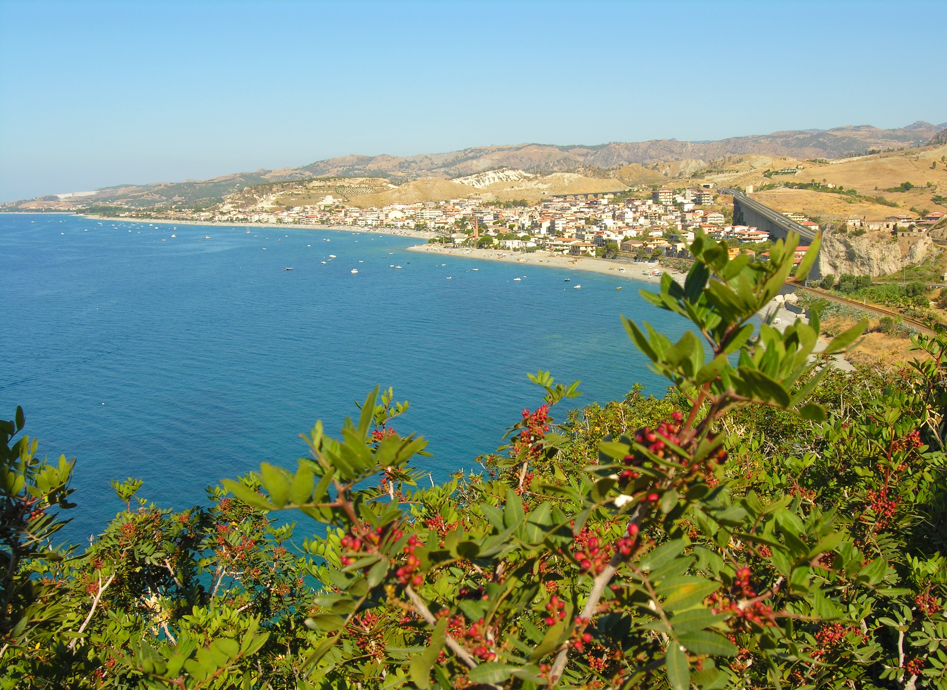 Calabria